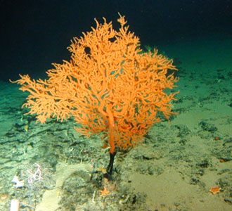 Leiopathes NOAA, Hawái